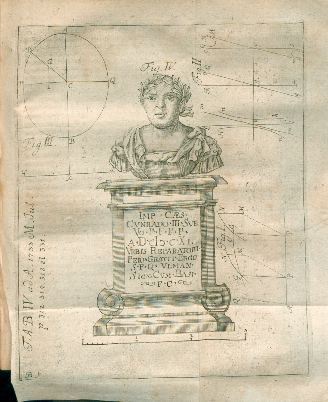 Illustration